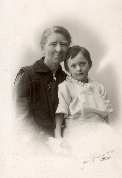 Lärarinnan Nanny Palmkvist med sin fosterdotter Maj.